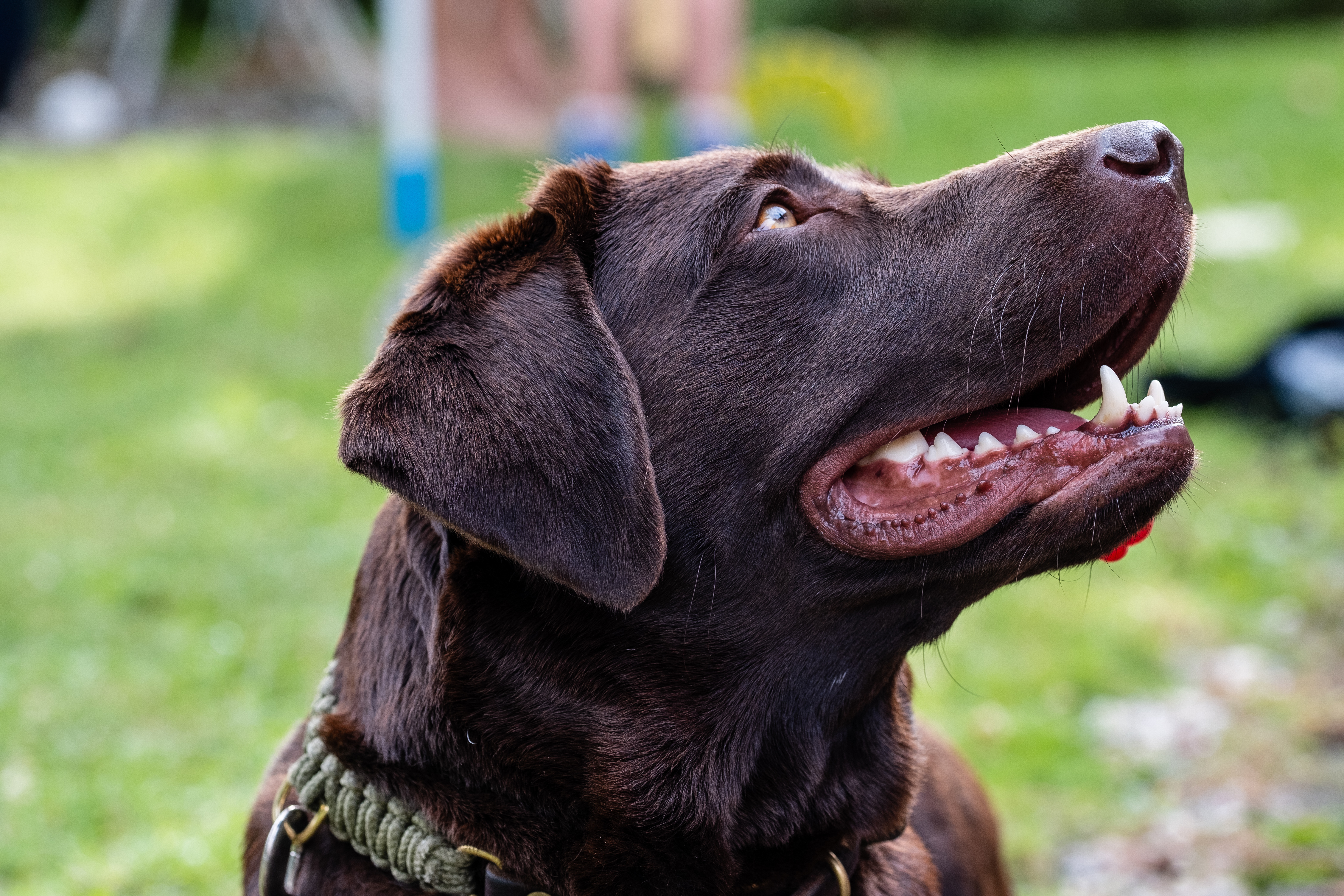 Portrait of a labrador retriever